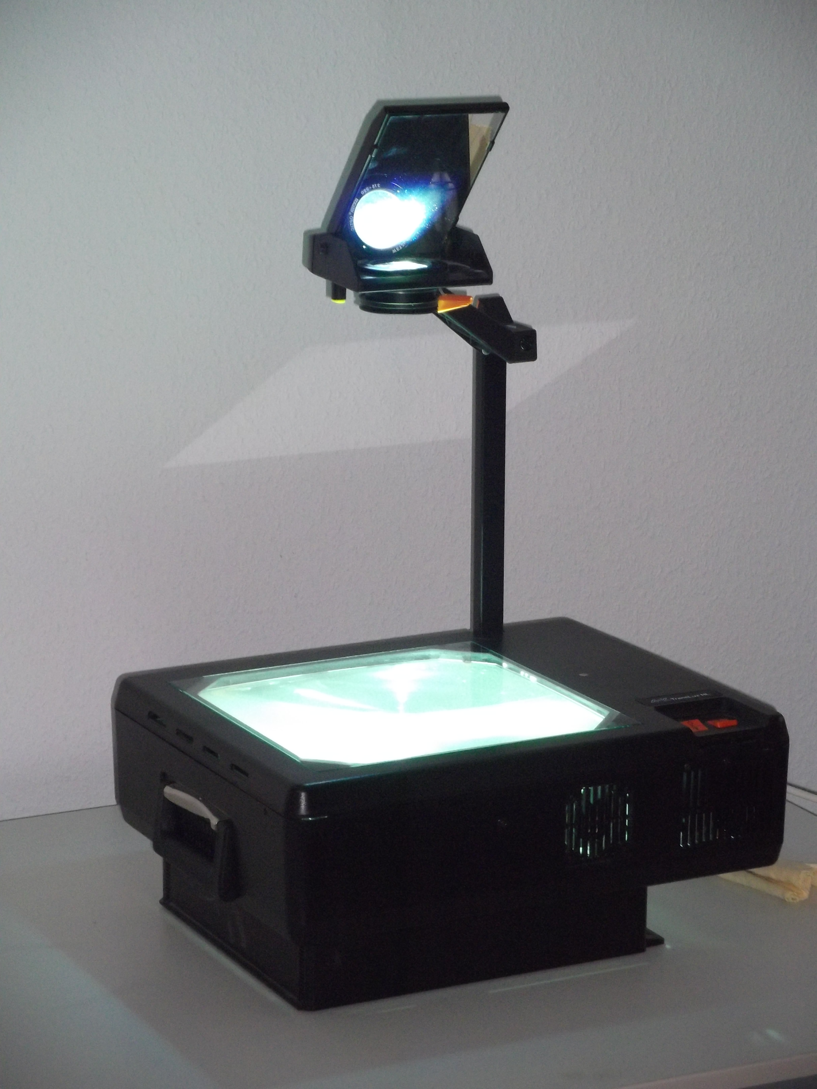 Overhead Projektor, als Reisegerät zusammenklappbar, Typ: A+K Translux HL, Metalldampflampe Osram HMP 400 DE